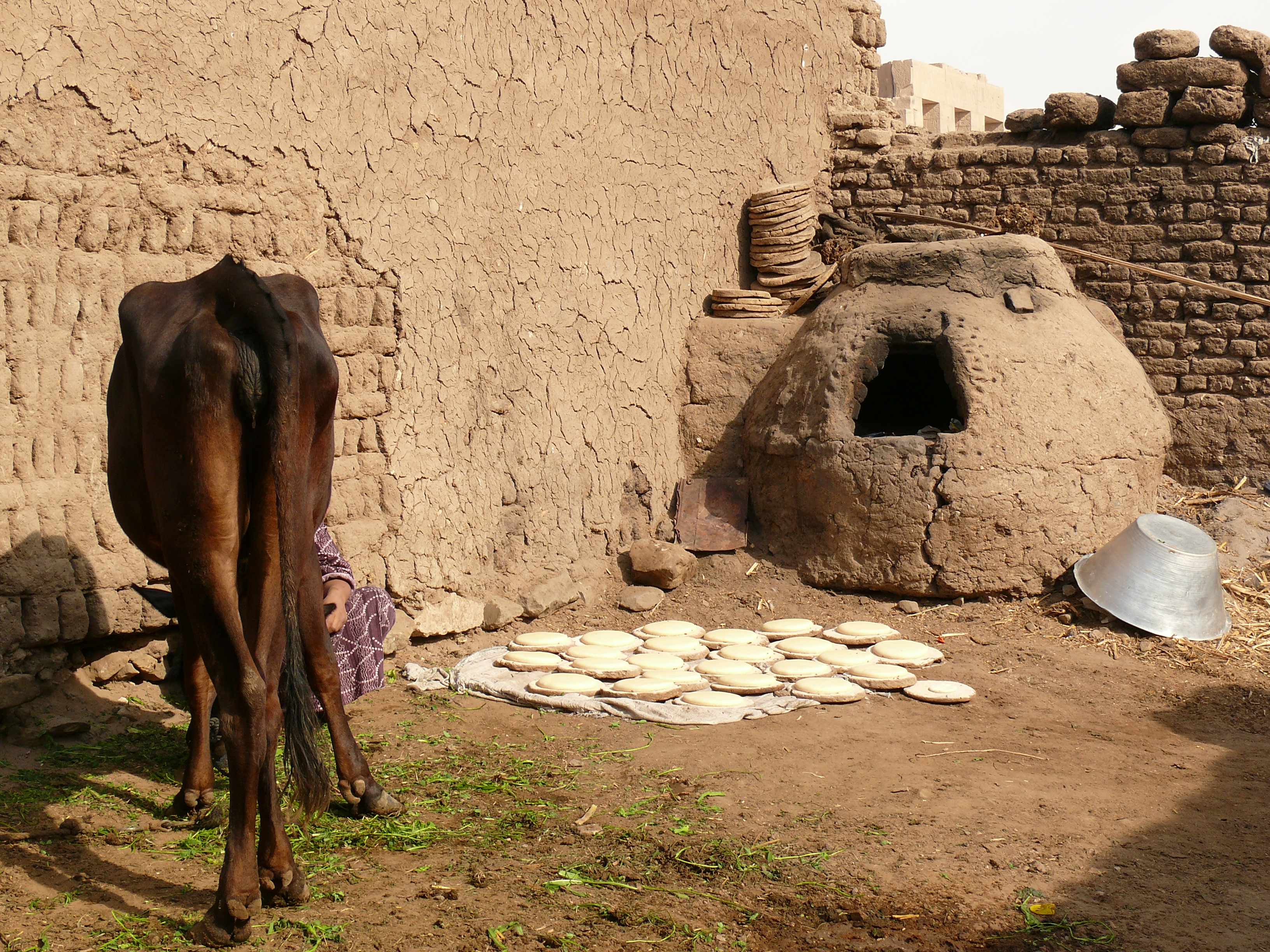 Fladenbrot-Herstellung mit Backofen, Oberägypten